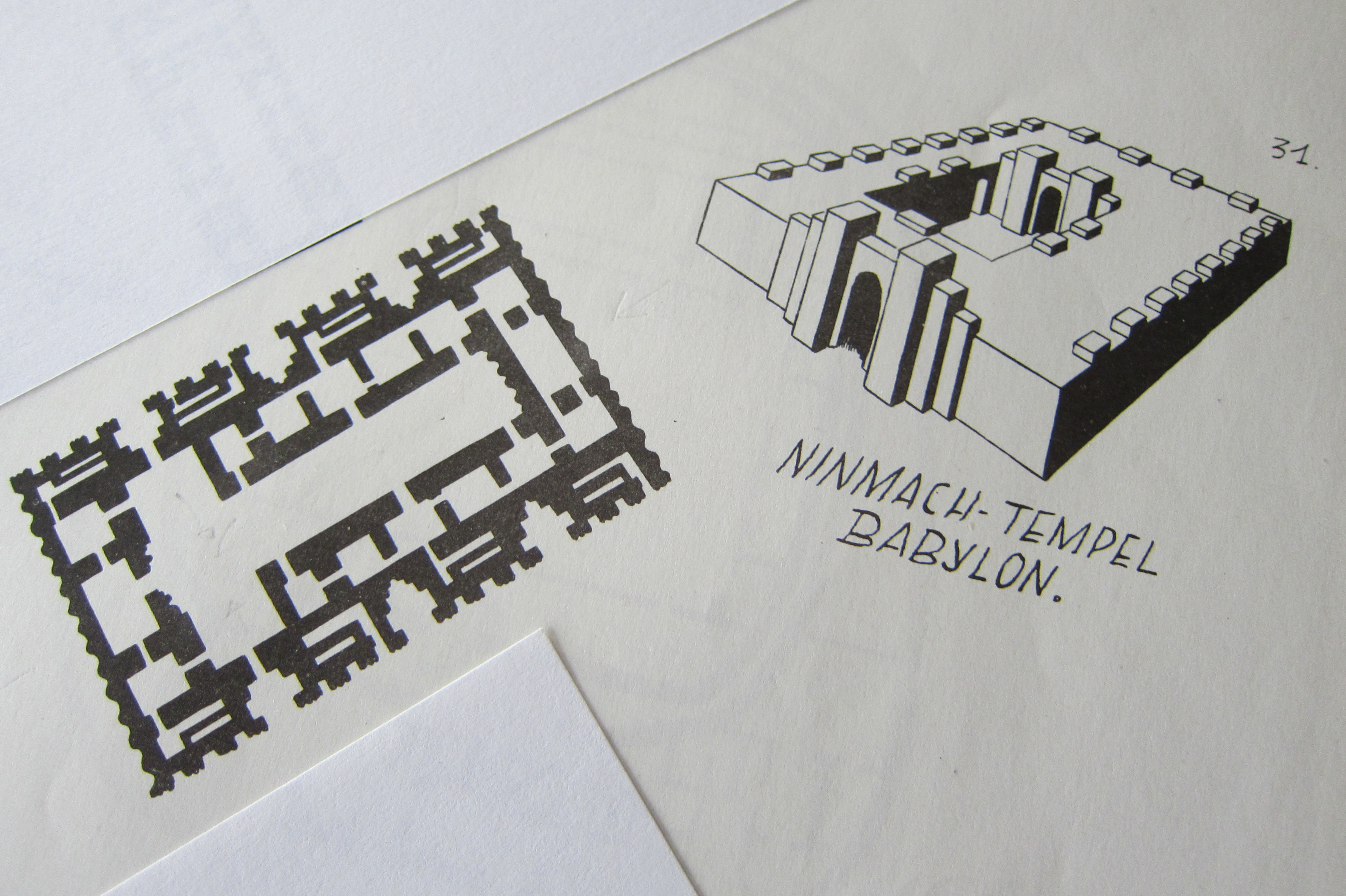 Plattegrond en perspectief van de Ninmach-tempel, Babylon